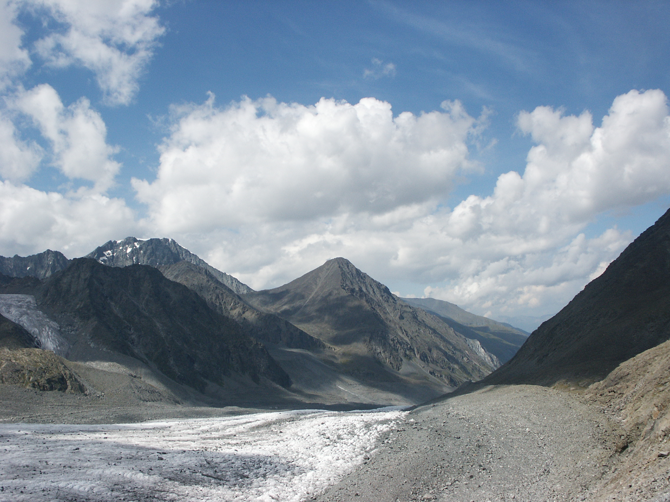 Вид на Аккемский ледник